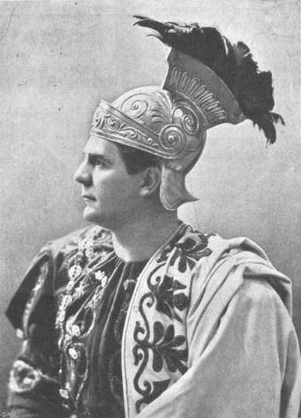 Hermann Benke (1866-1937) Österreichischer Schauspieler. Rolle: Marcus Superbus. Austrian Actor. Role: Marcus Superbus. Magyar színész.